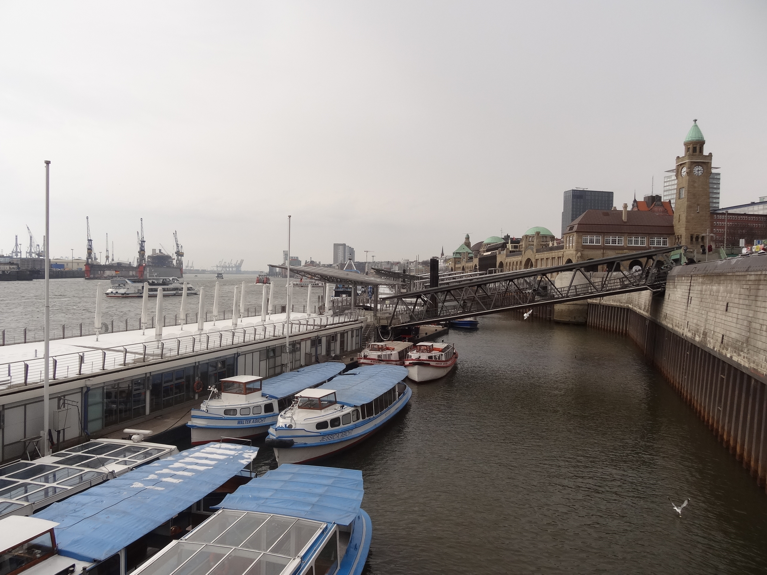 Landungsbrücken